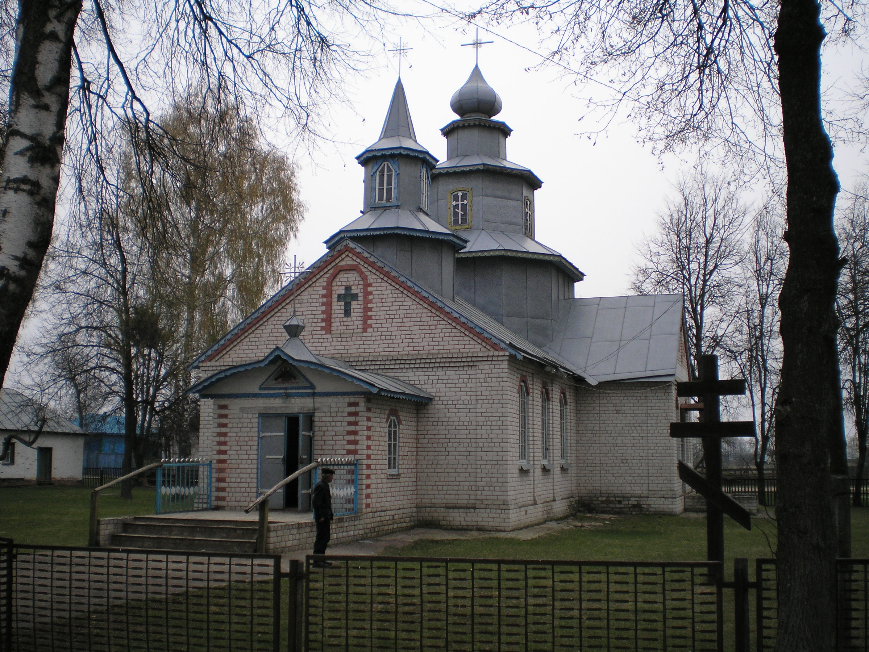 Церква в с.Конятин